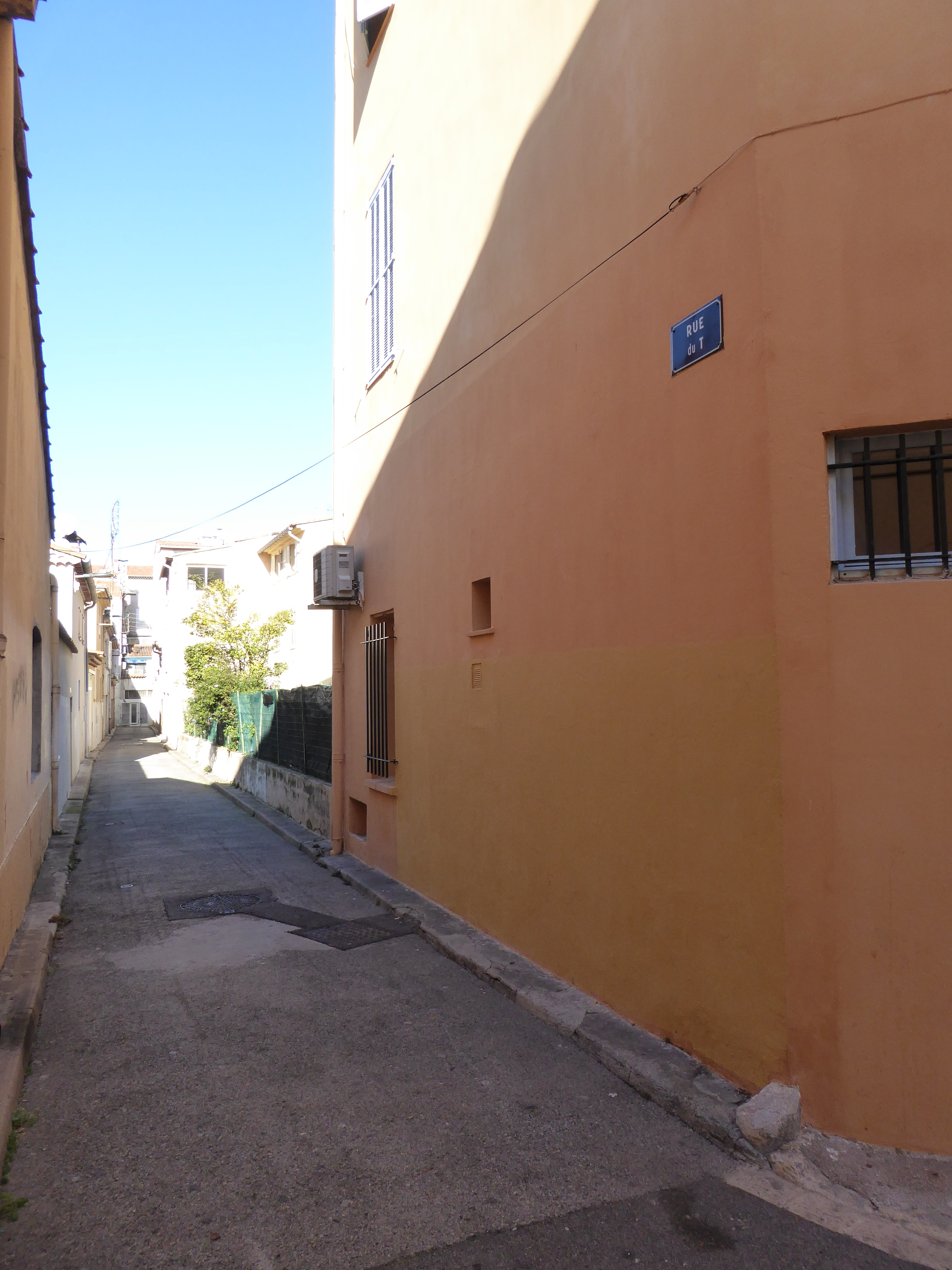 streets in Antibes